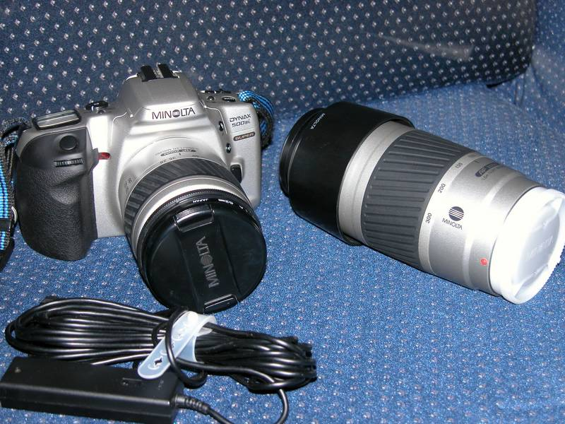 מצלמת רפלקס ואביזריה. צולם על ידי אפי ב.